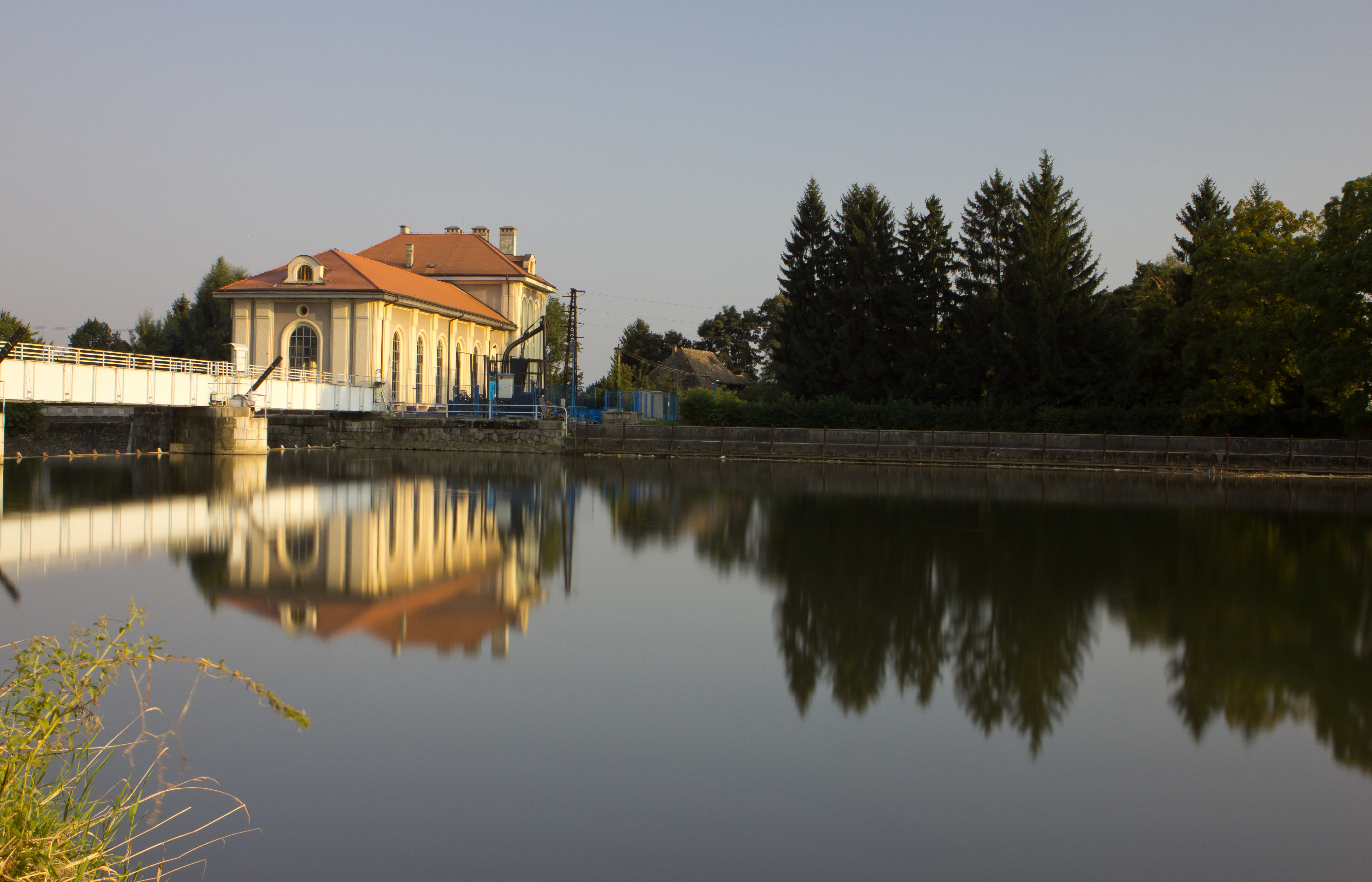 Kroměříž Strž 1